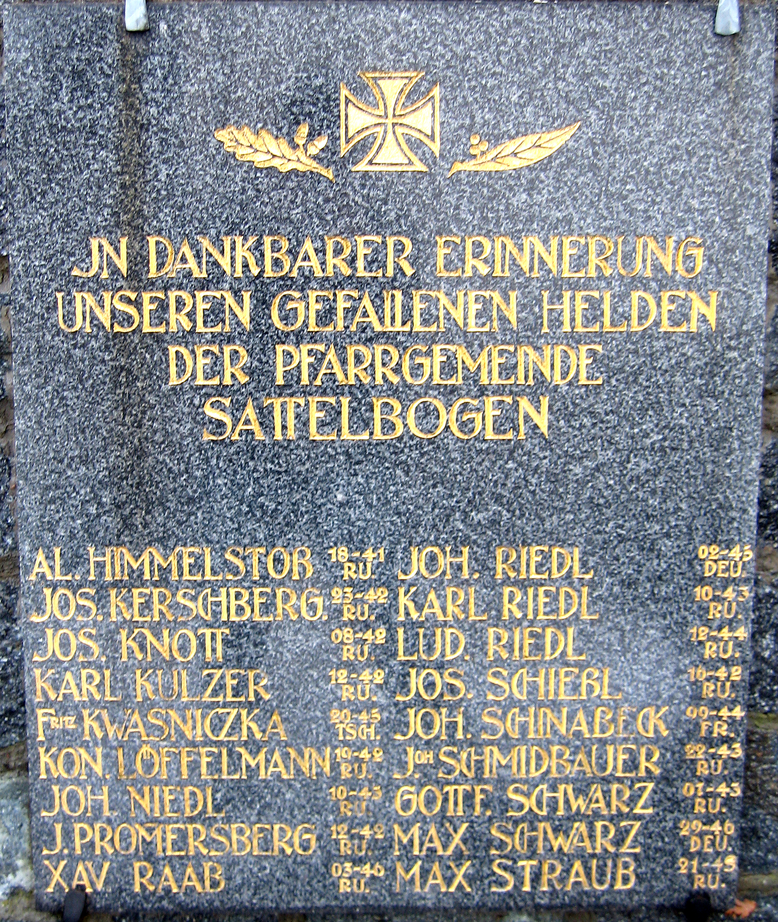 Sattelbogen: Kriegerdenkmal bei der Kirche (mitte)